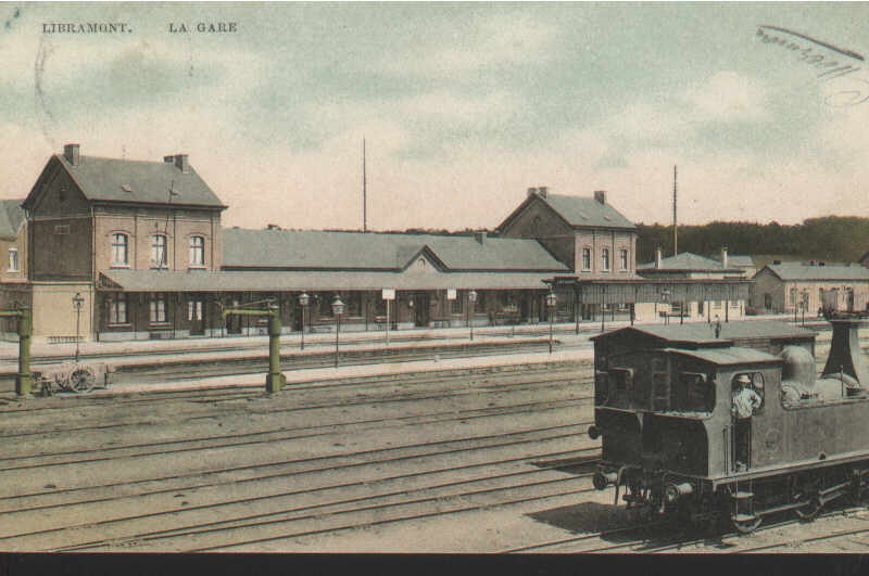 L'intérieur de la gare de Libramont, avec le bâtiment voyageurs et les voies.